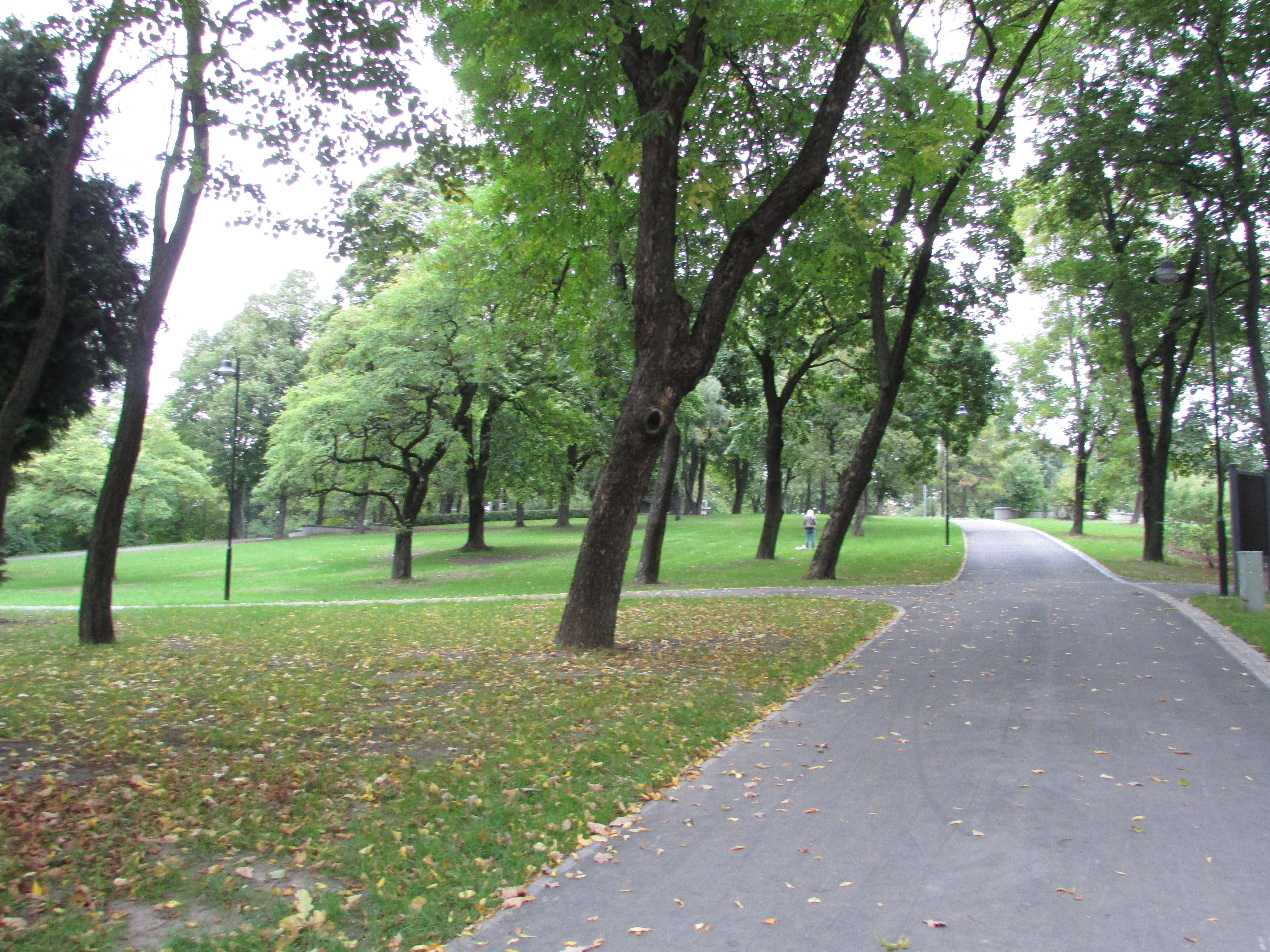 Grīziņkalna parks, Rīga, Pērnavas iela